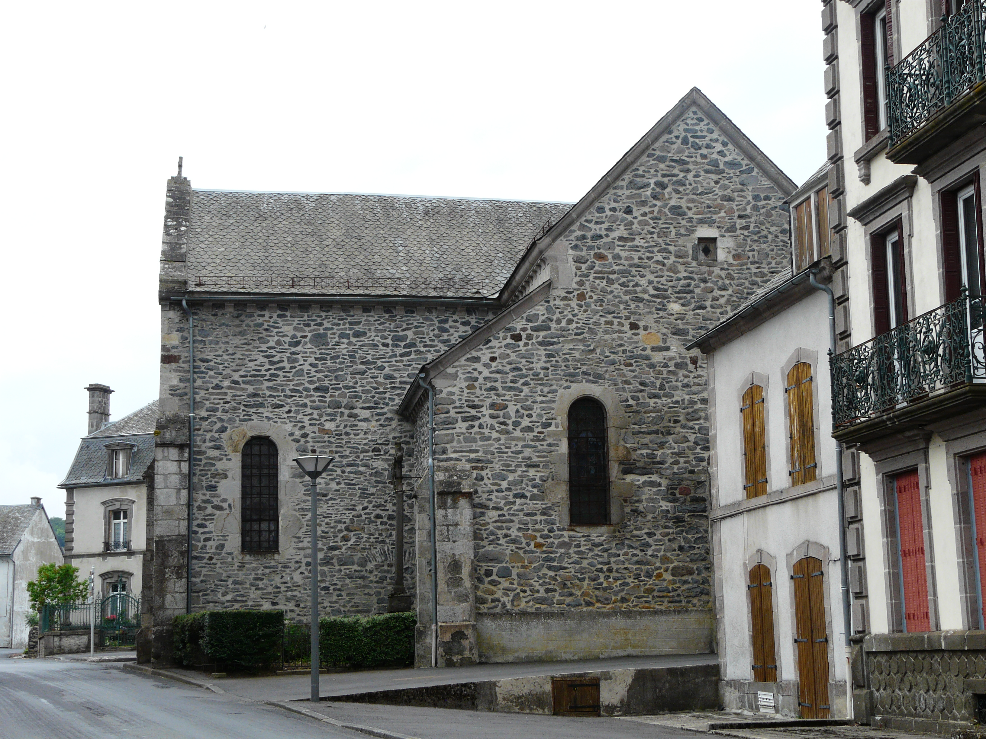 L'église Saint-Blaise, Marcenat, Cantal, France.